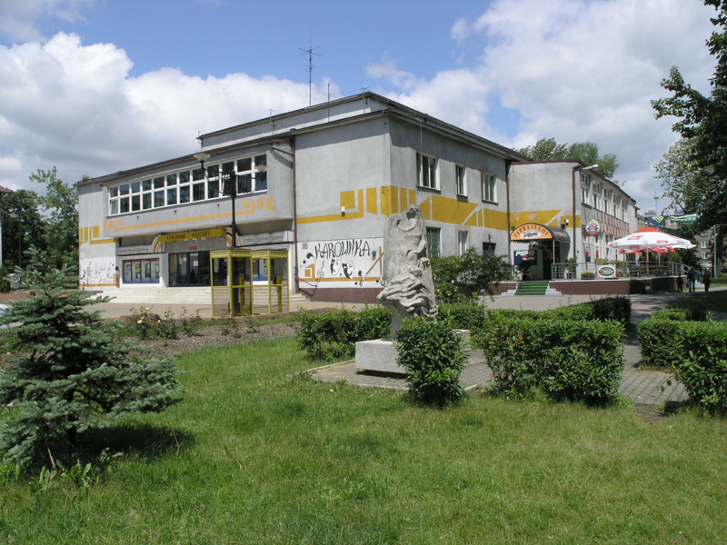 Centrum Kultury "Karolinka" w Rzadionkowie